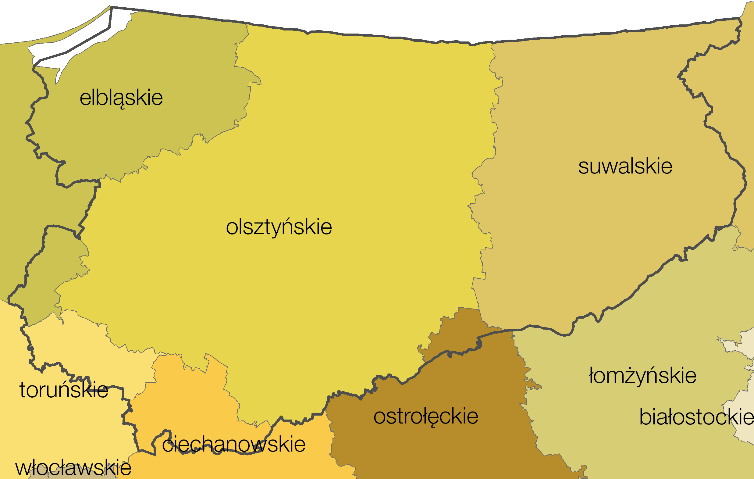 Województwo warmińsko-mazurskie (od 1999) jako powstałe z województw podziału administracyjnego Polski z lat 1975-1998